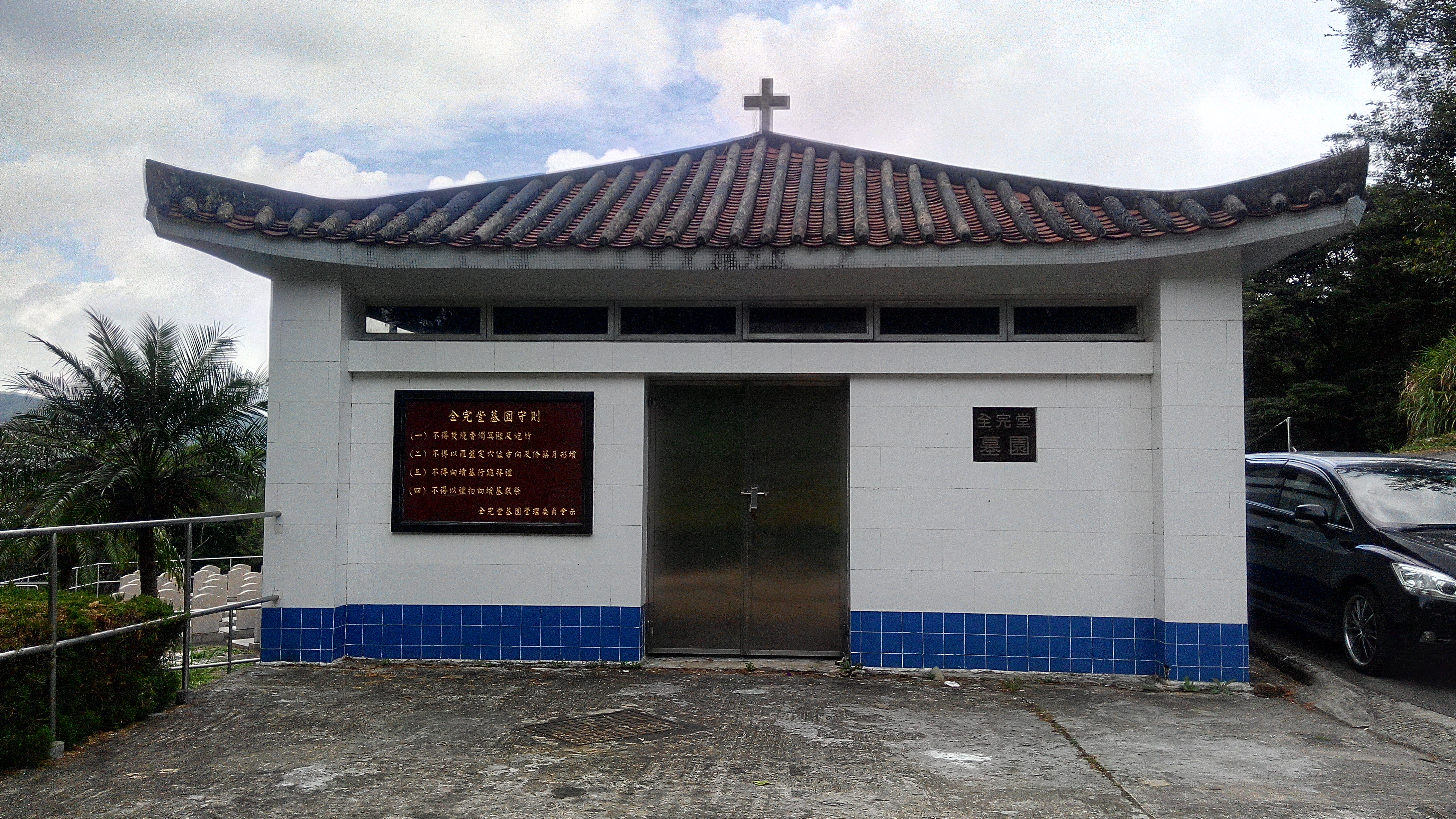 中文（香港）: 川龍全完堂墳場